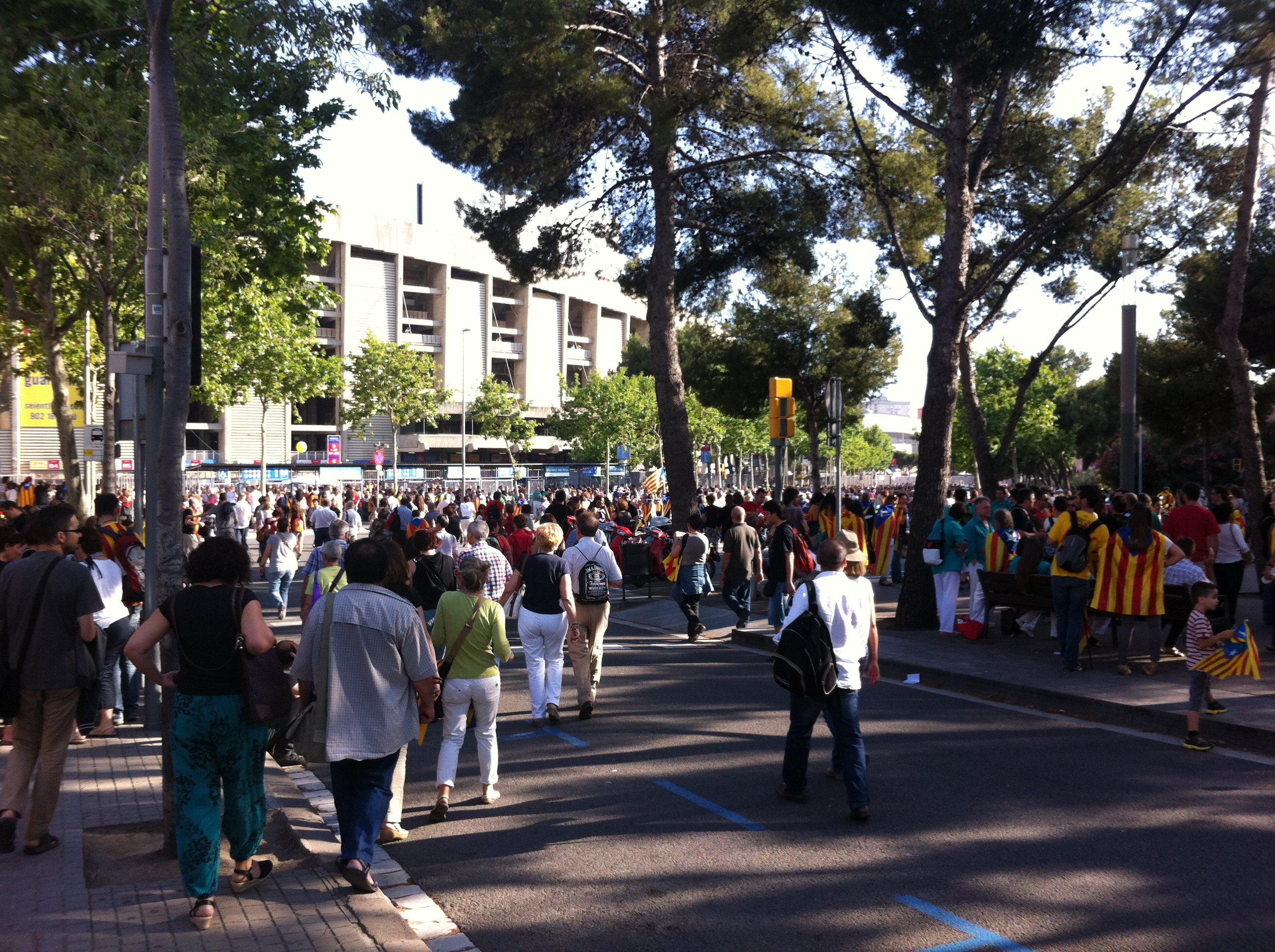 Aspecte dels voltants del Camp Nou abans del Concert per la Llibertat 2013